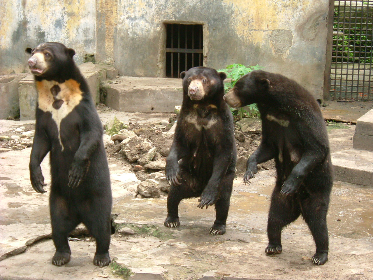 Sun bear (Beruang Madu, マレーグマ) (Helarctos malayanus) at Medan old zoo in Jalan Brigjen Katamso, Medan, North Sumatra, Indonesia.